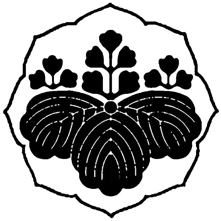 中文（台灣）: 外側紋樣為三神器中的八咫鏡，內側為五三桐